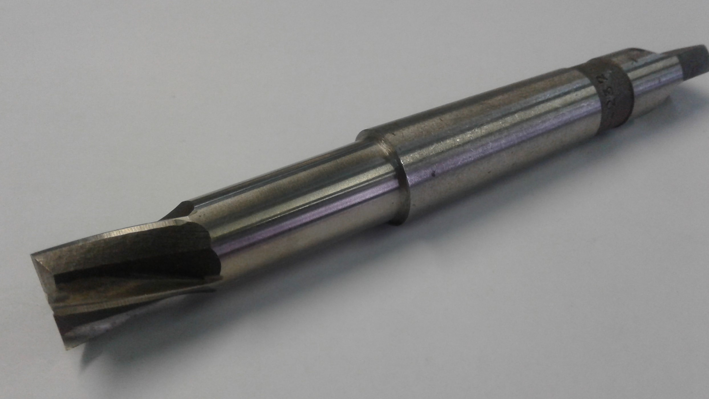 Цилиндрический цельный зенкер с четырьмя режущими кромками и коническим хвостовиком.